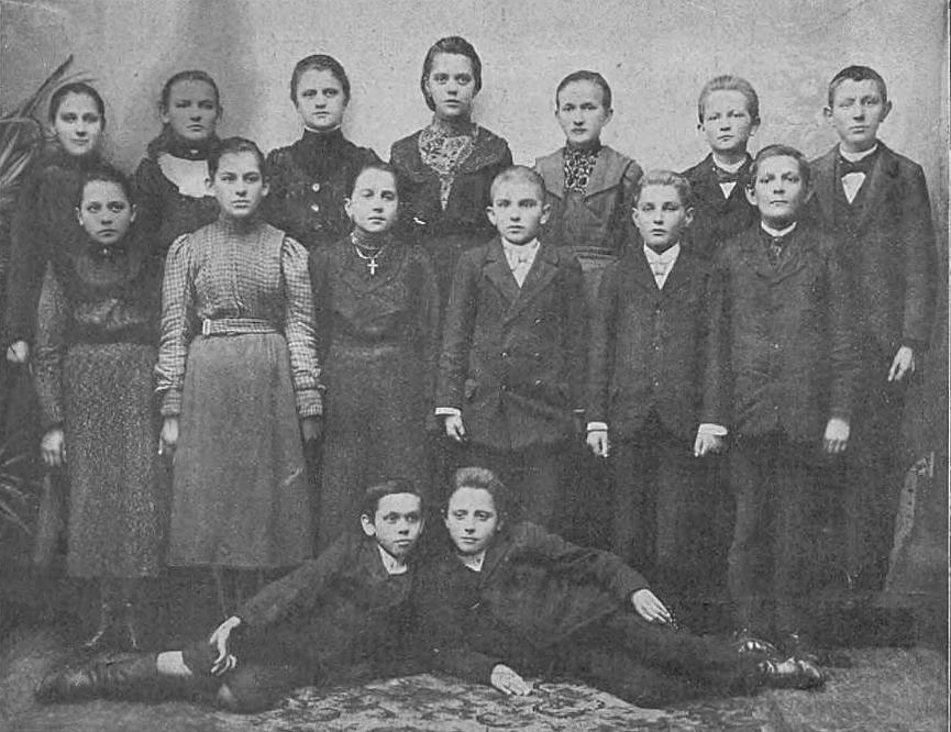 Dzieci strajkujące we Wrześni 20 maja 1901